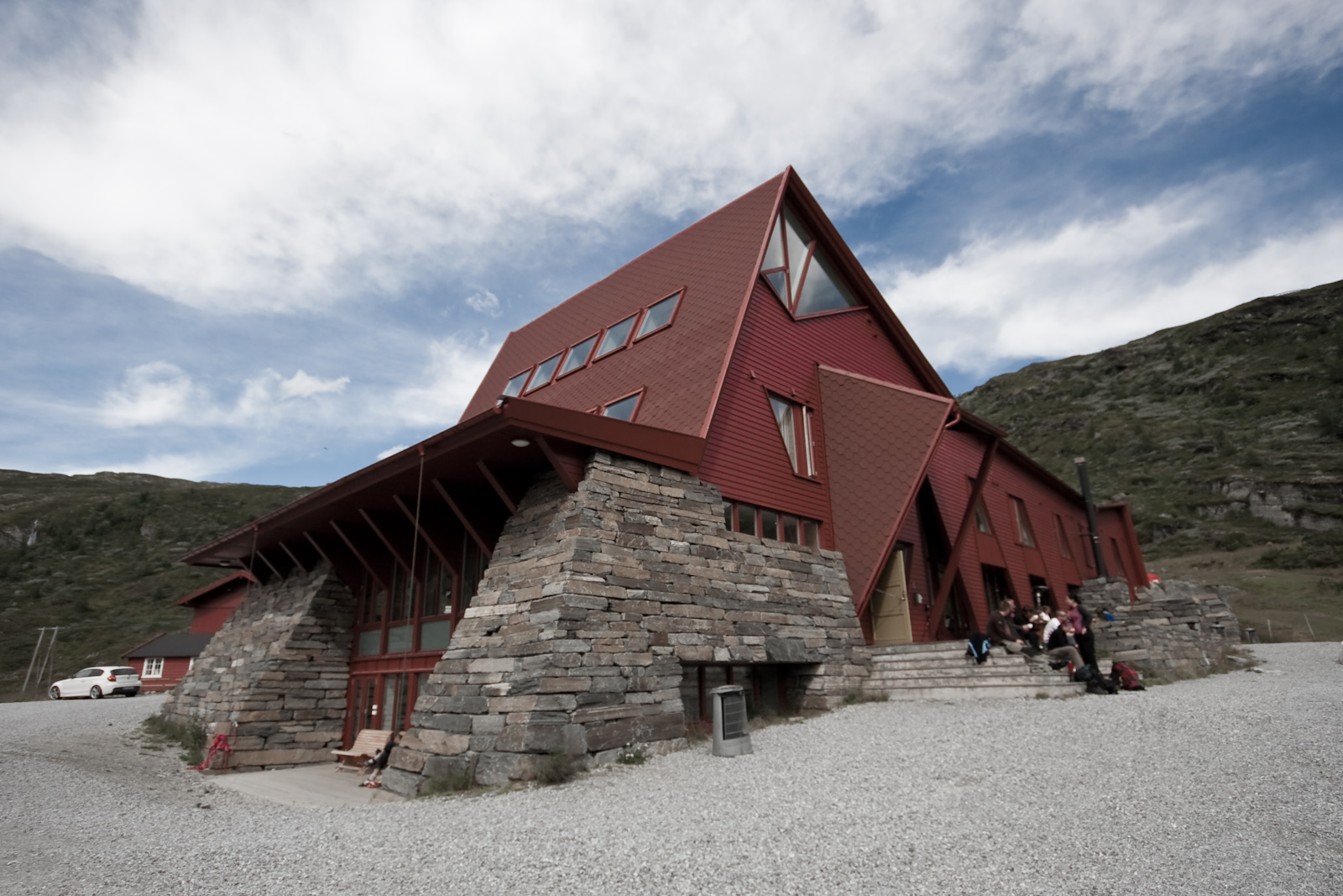 Turtagø Hotel